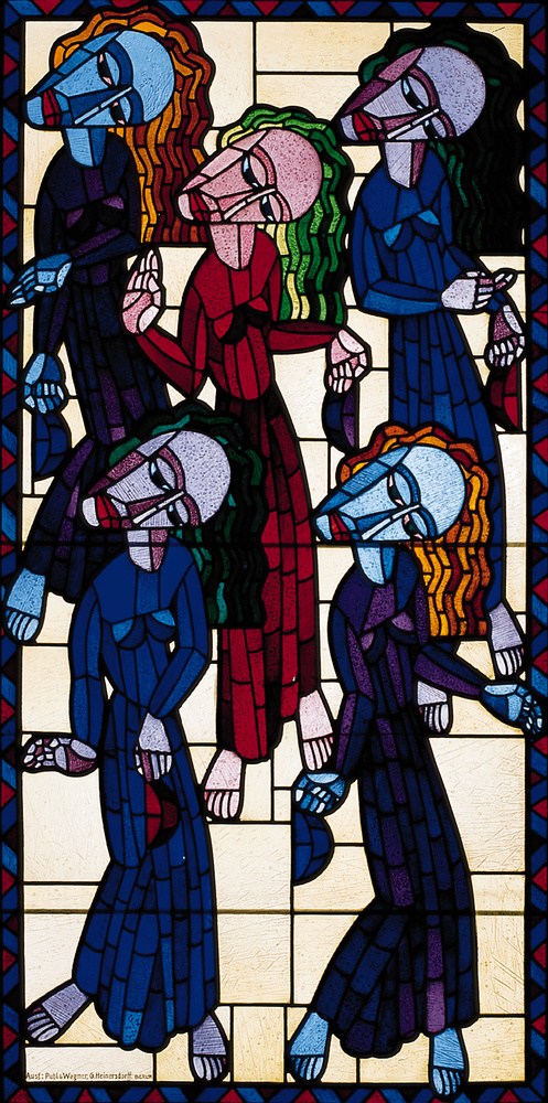 Ewald Dülberg Nationalité allemande 1888, Allemagne - 1933, Allemagne Vitrail Les Vierges Folles 1922 Verres colorés, plomb, mastic, acier 128,5 x 64,5 x 0,7 cm B.G.: Ausf.: Puhl & Wagner, G. Heinrersdorff, Berlin Don de Paul Horn en 1958 Musée d'Art moderne et contemporain de la Ville de Strasbourg Inv. : LVIII 10